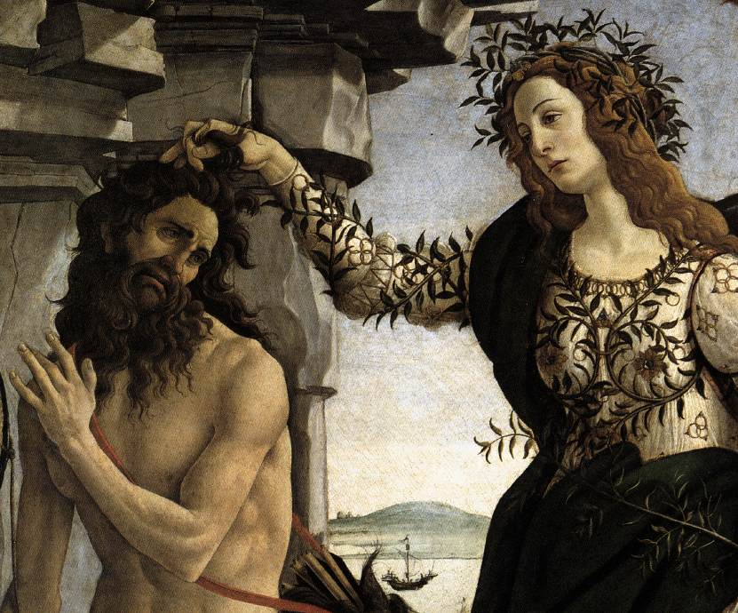 detail